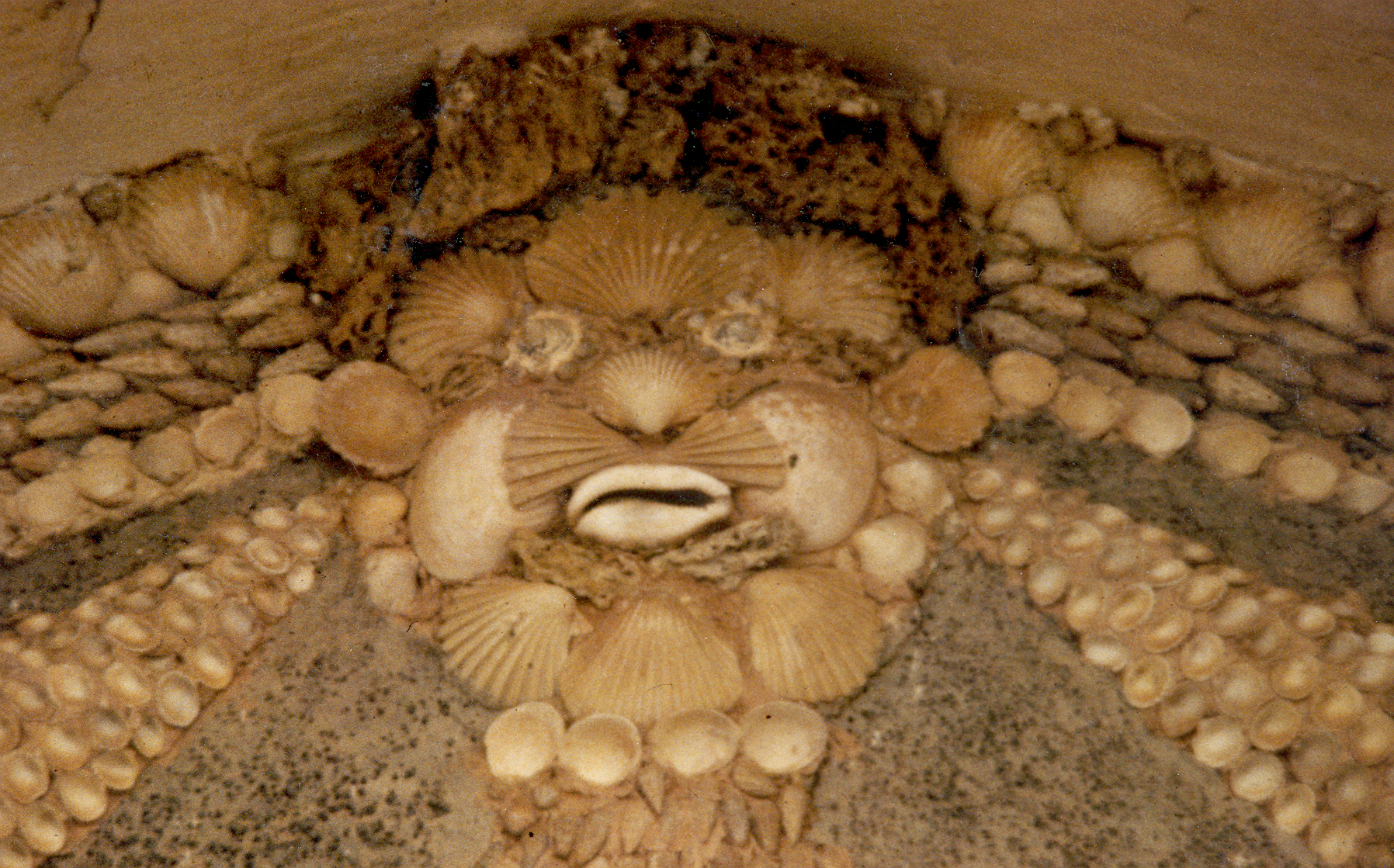 Composition en coquillages, un Dieu-le-Père dont des cornes d'abondances sortent des oreilles...